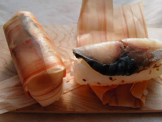 北山杉を削りだした薄皮に包まれた鯖寿司（道の駅ウッディ京北にて）